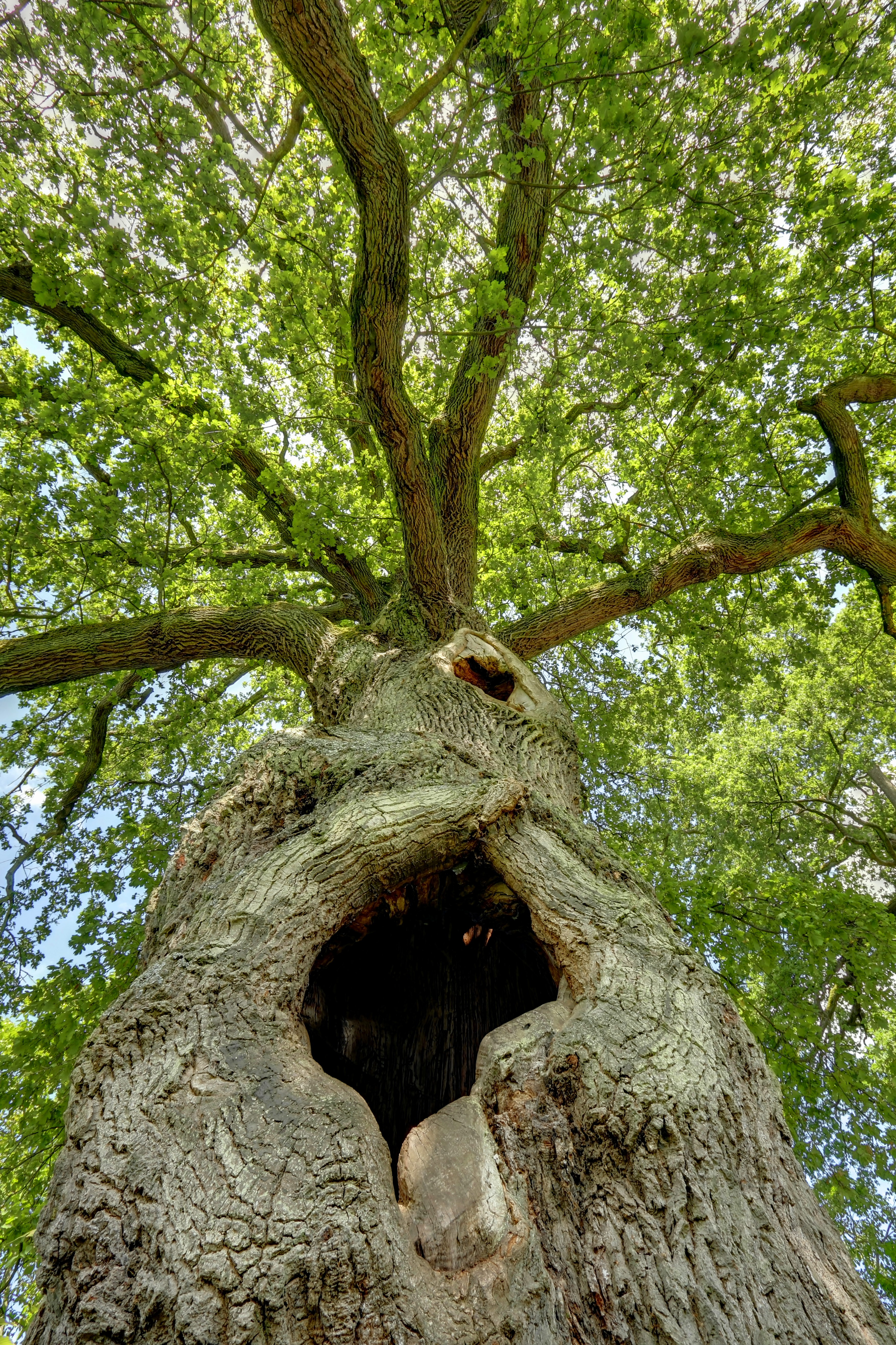 Eines der Naturdenkmale "6 Alteichen (davon 2 Zwillingseichen)" bei Sankt Gangolf.